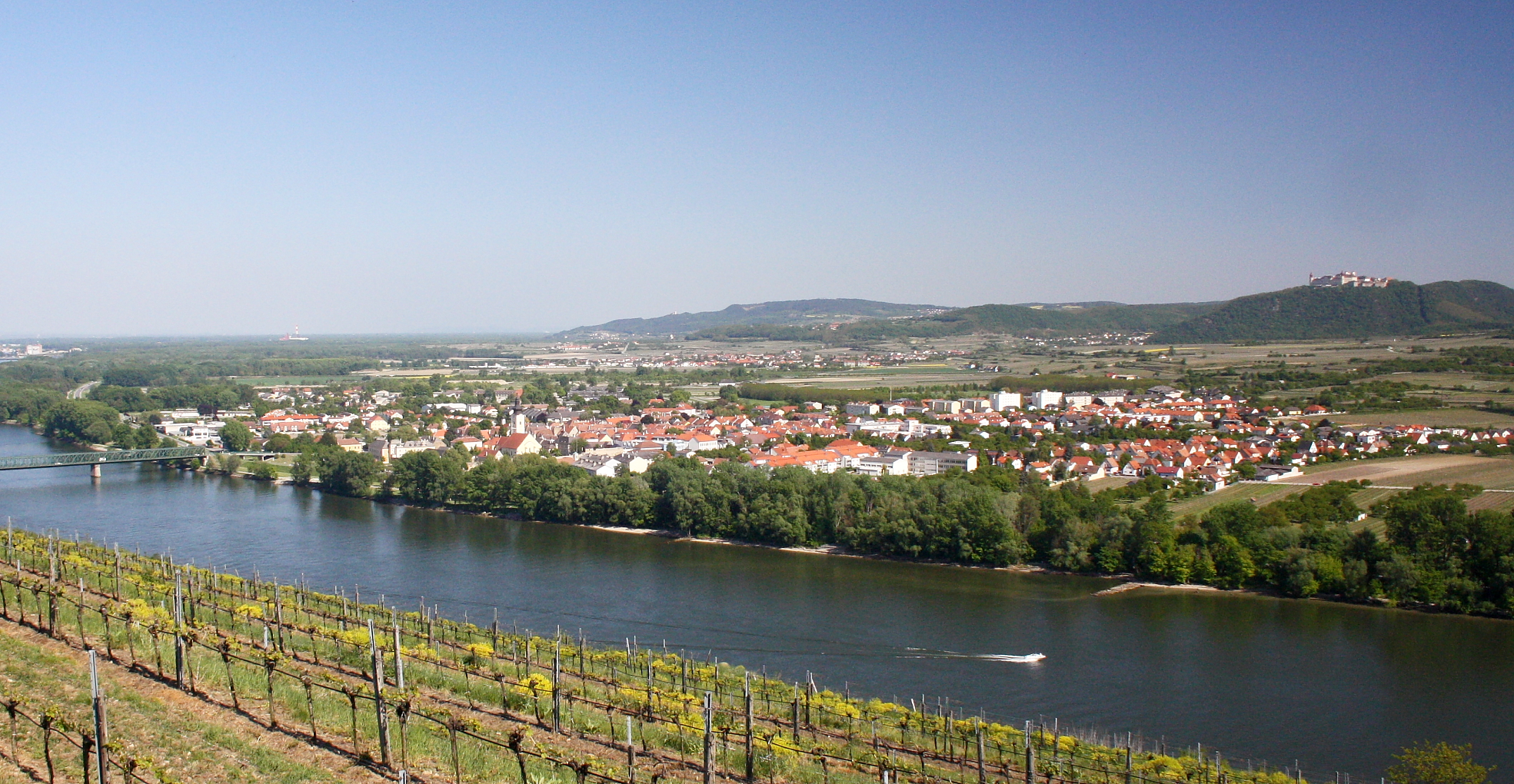 Nordwestansicht von Mautern an der Donau; rechts im Hintergrund das Stift Göttweig.